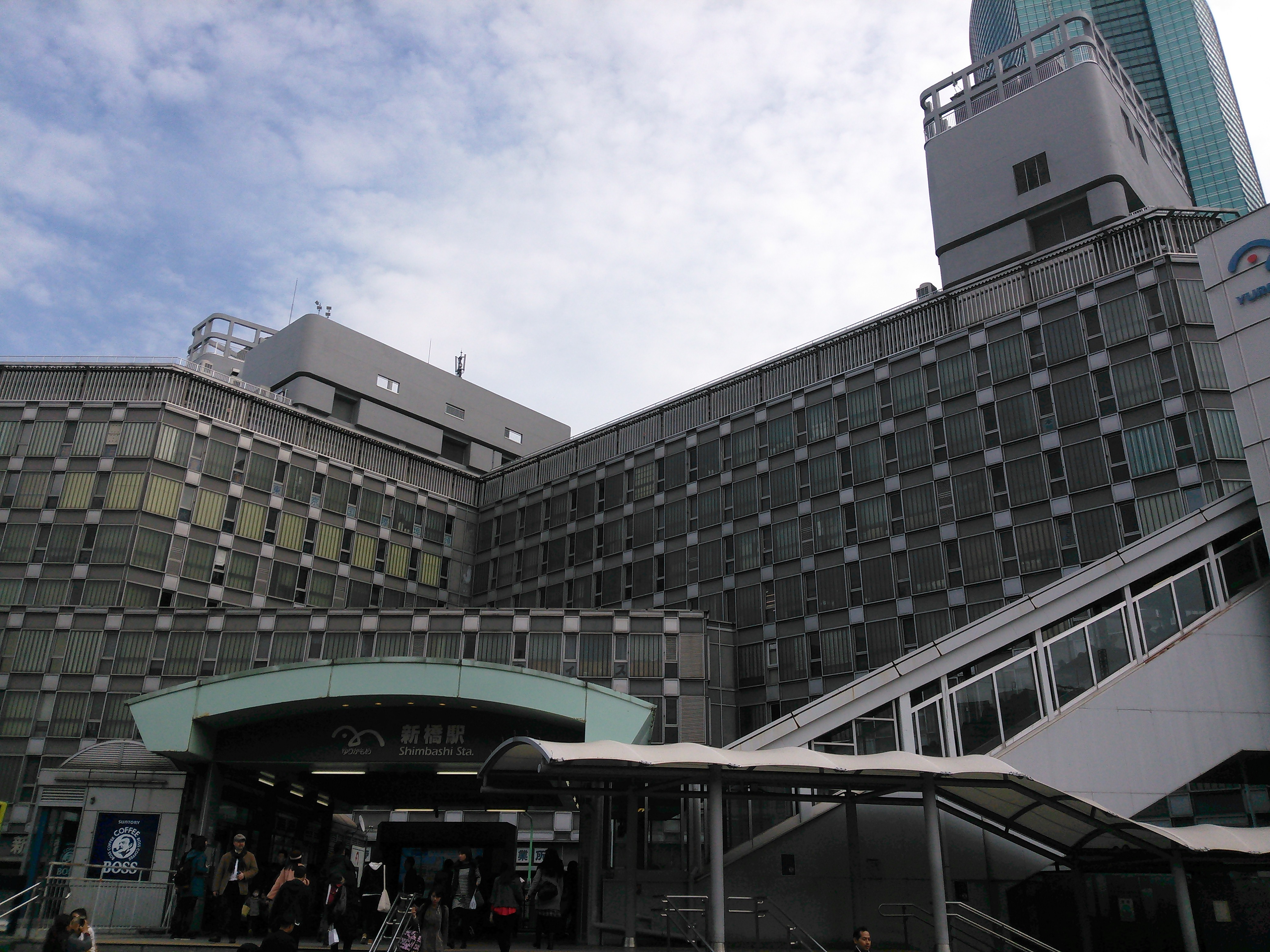 東京都港区新橋、新橋駅前ビル1号館